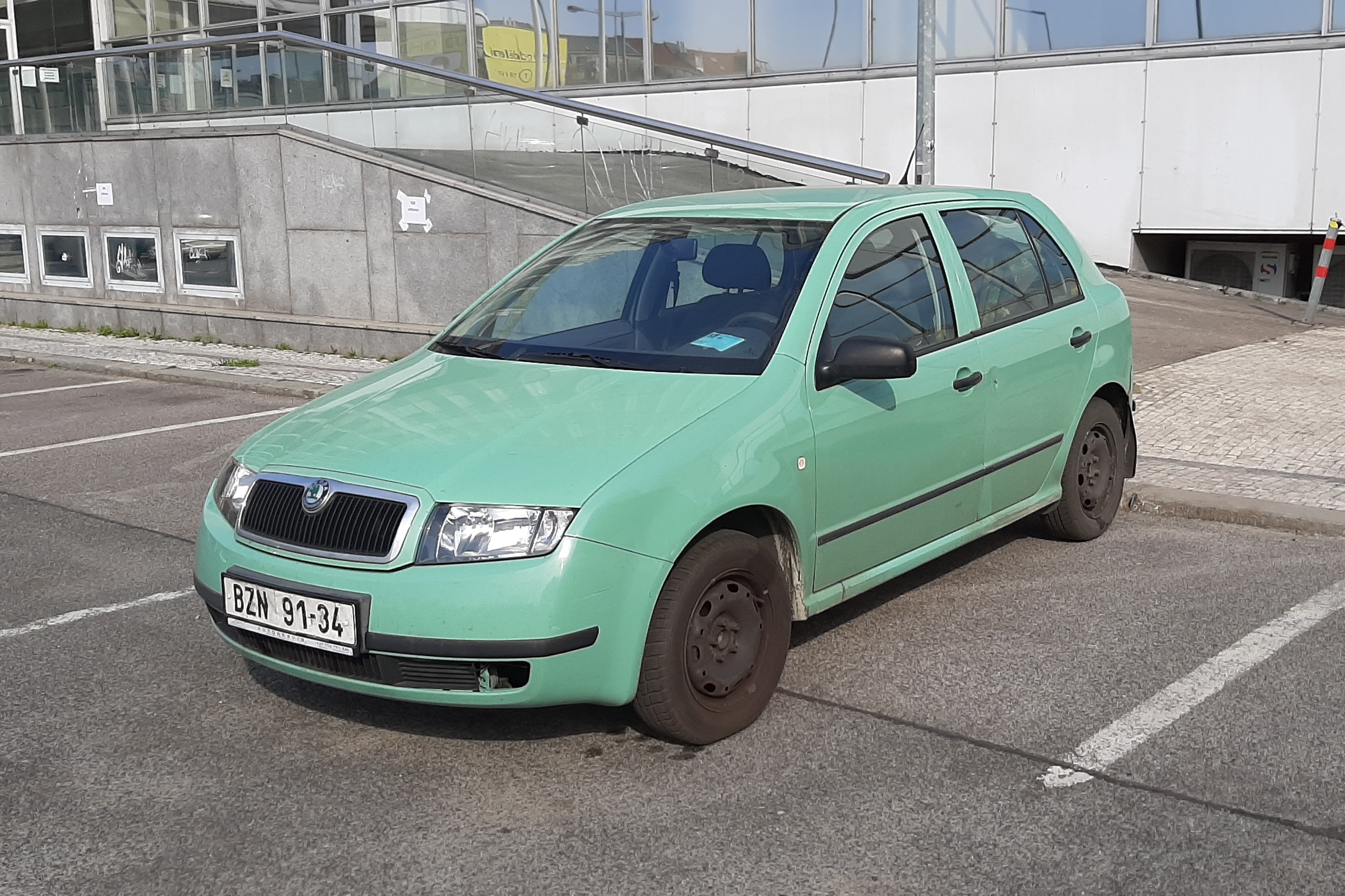 Specificky zbarvená Škoda Fabia.